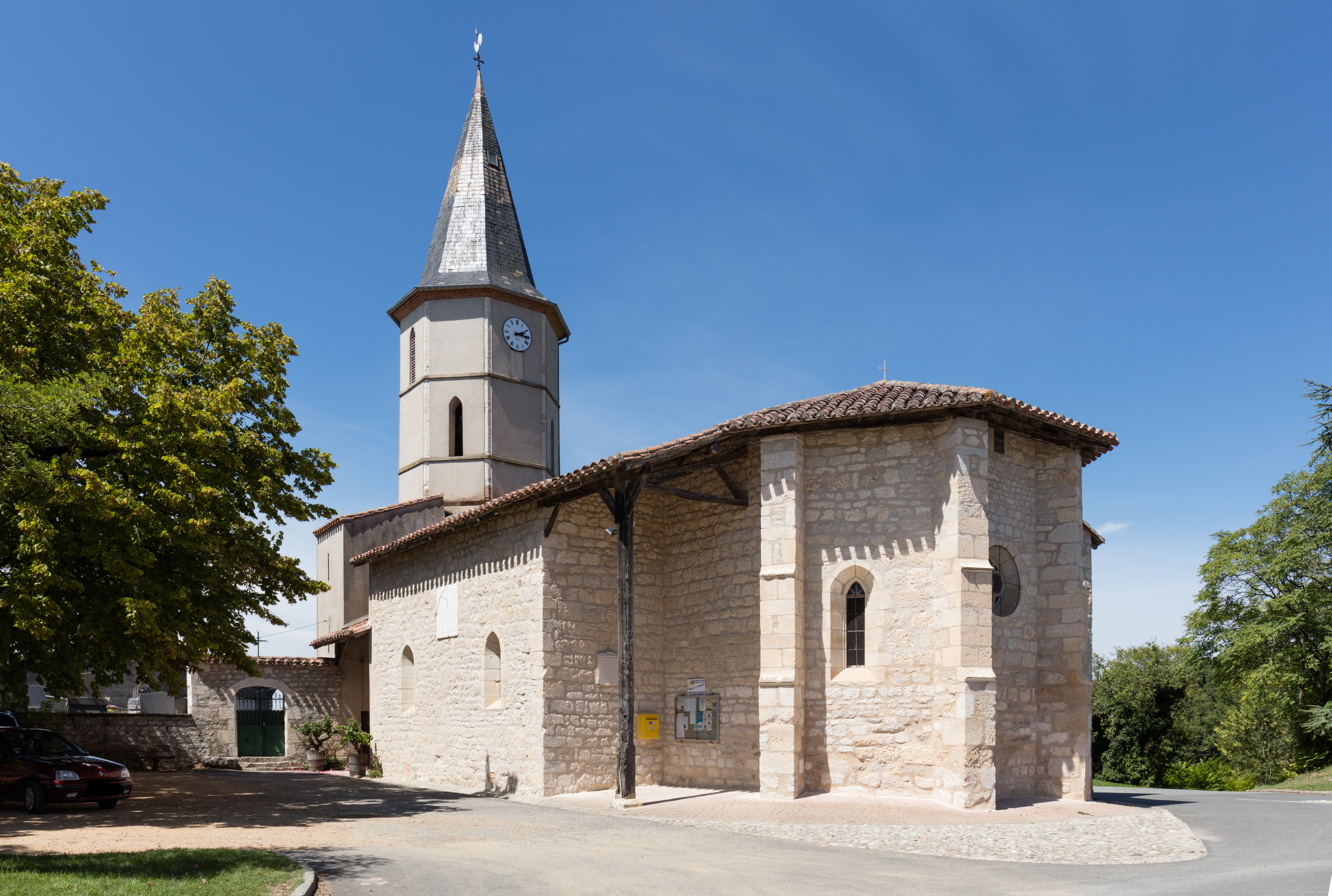 L'église de Saint André sur la commune de Castanet, Tarn